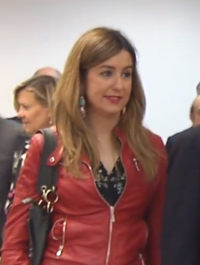 Visita a Aciturri y Montefibre (Miranda de Ebro).